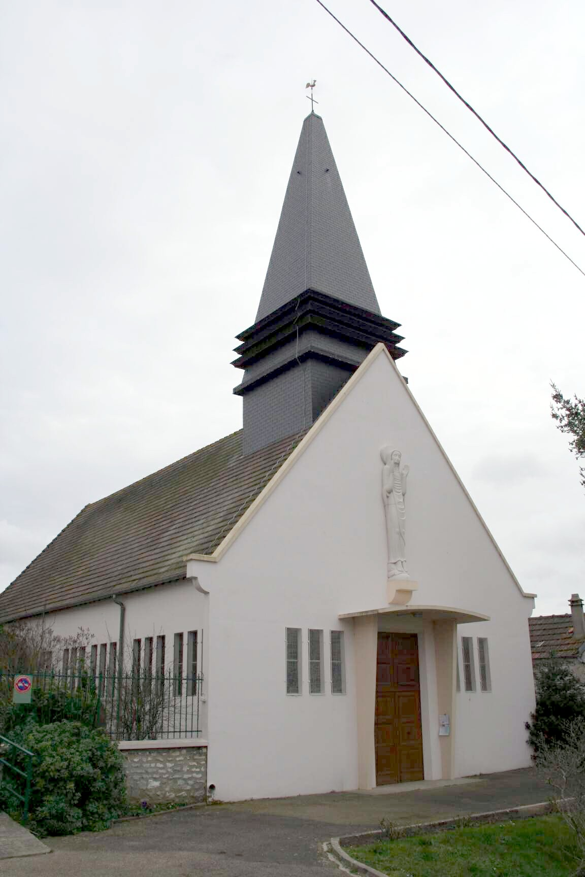 Église de Guernes - Yvelines (France)